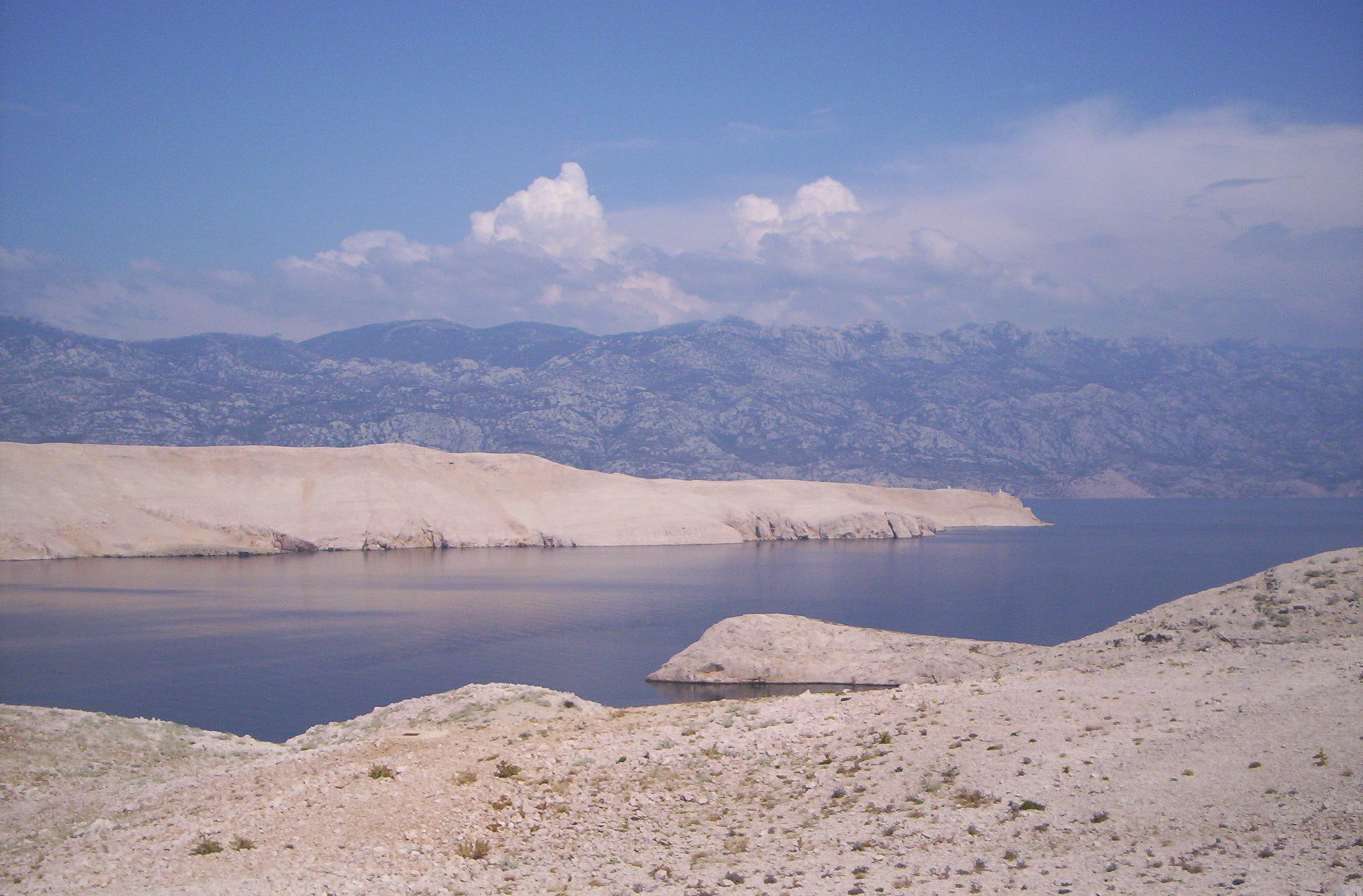 Pag - widok na ląd